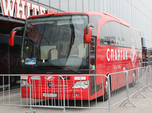 Автобус «Спартака» в Москве перед матчем с «Локомотивом»